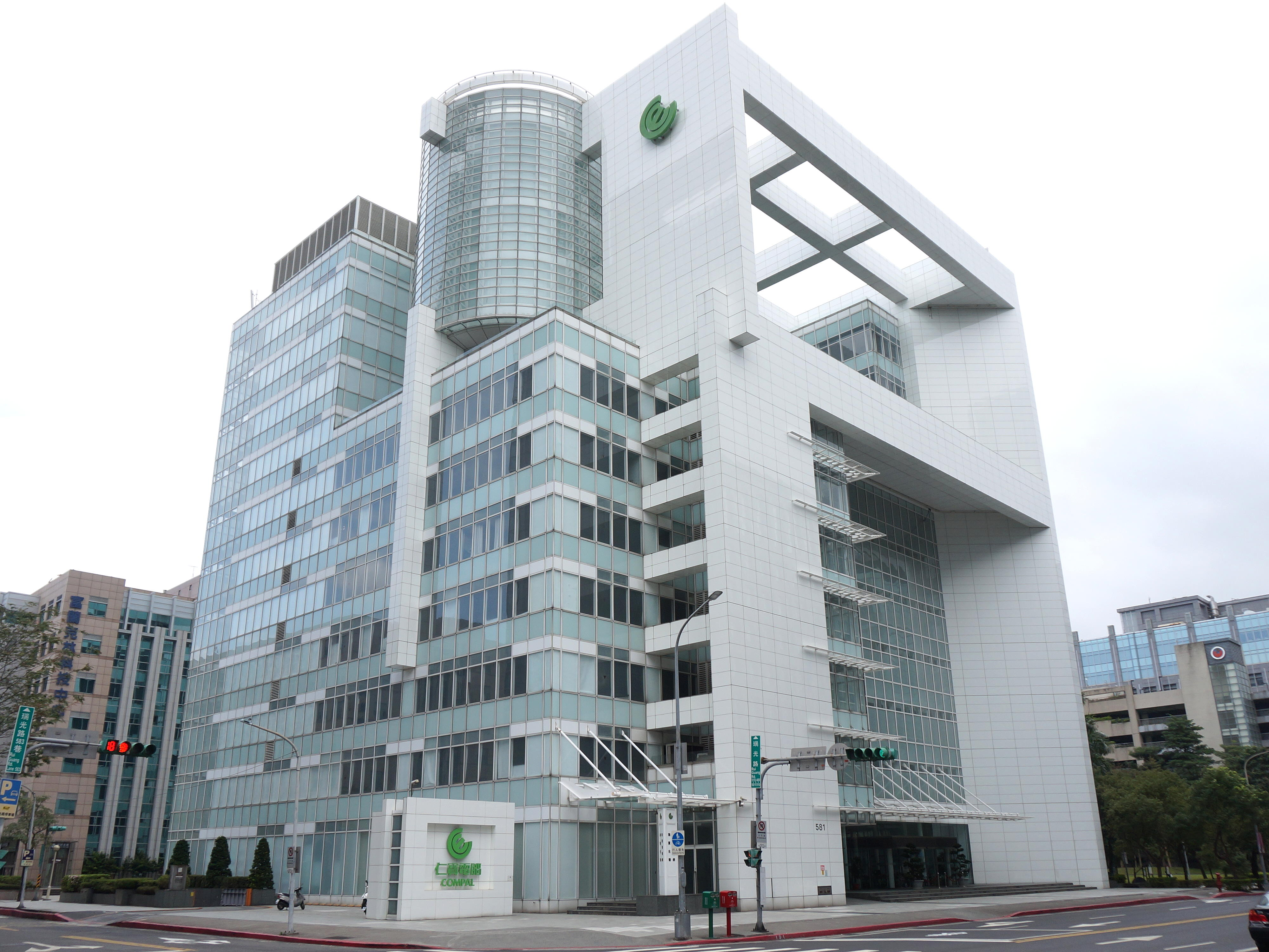 仁寶電腦台北辦公室，是仁寶電腦總部所在地，地址：臺北市內湖區瑞光路581、581之1號。